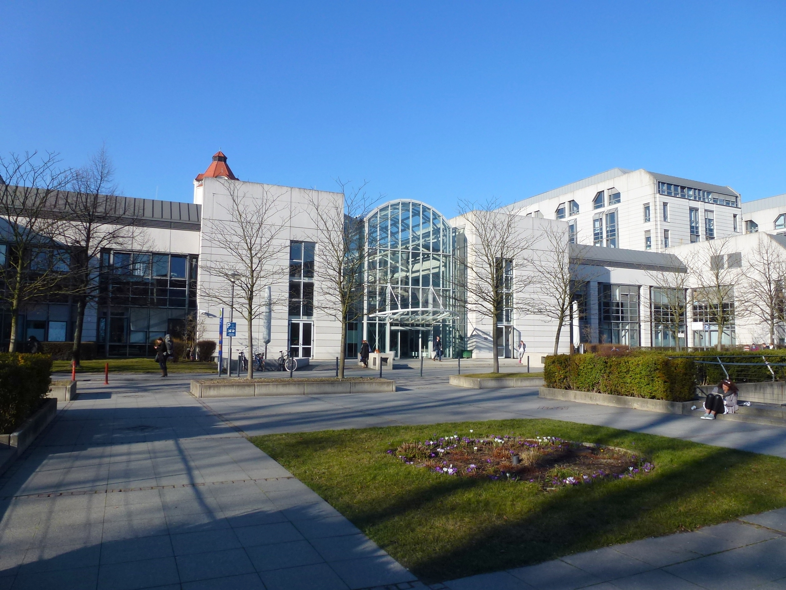 Berlin-Wedding Virchow-Klinikum Mittelallee 10